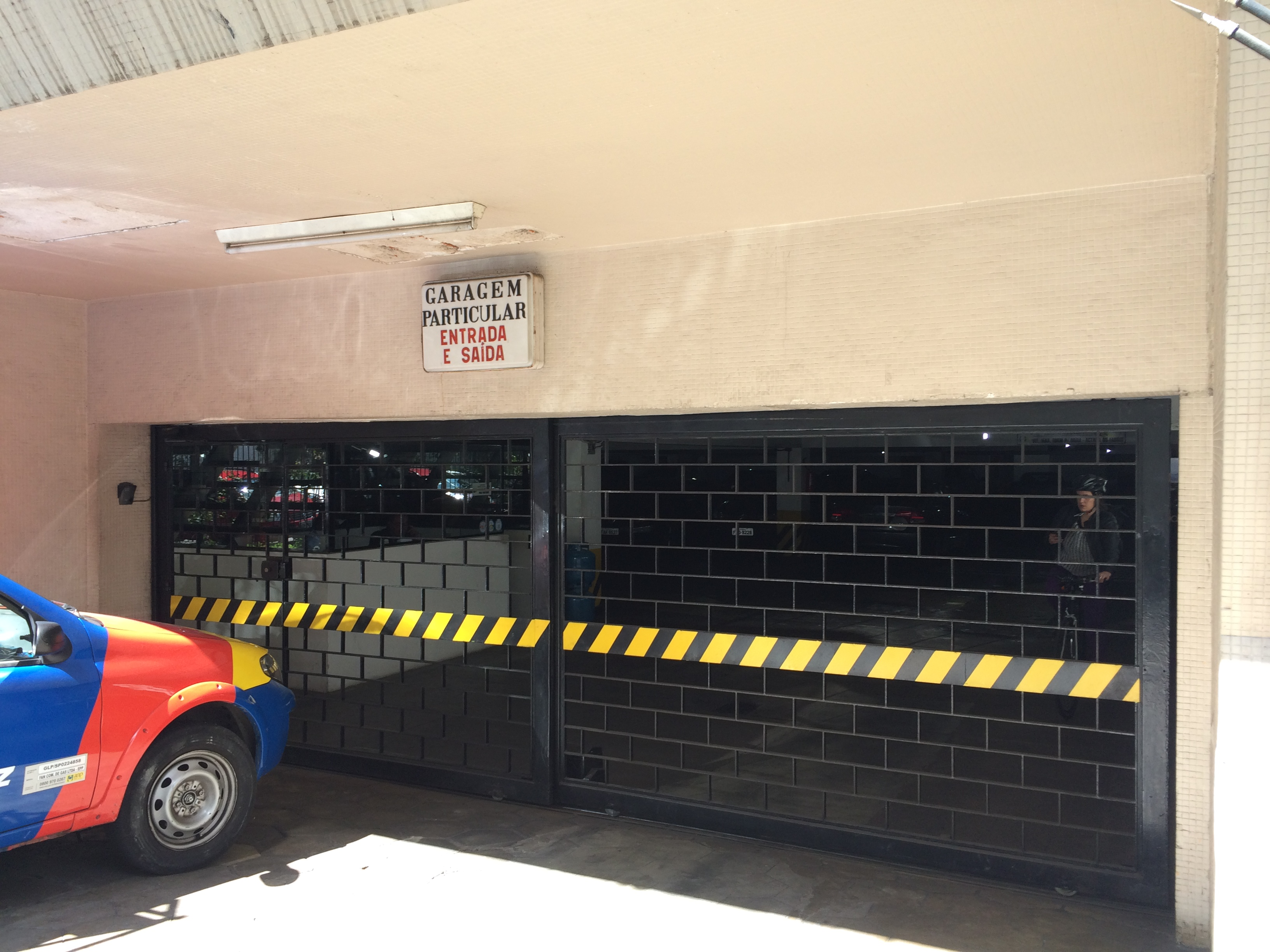 Entrada da garagem principal de veículos do Edifício São Carlos do Pinhal, em São Paulo, SP (Brasil).